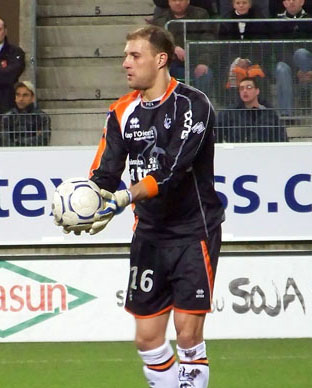 Match de Foot Rennes - Lorient, 23 Février 2008, Ligue 1 Saison 2007-2008